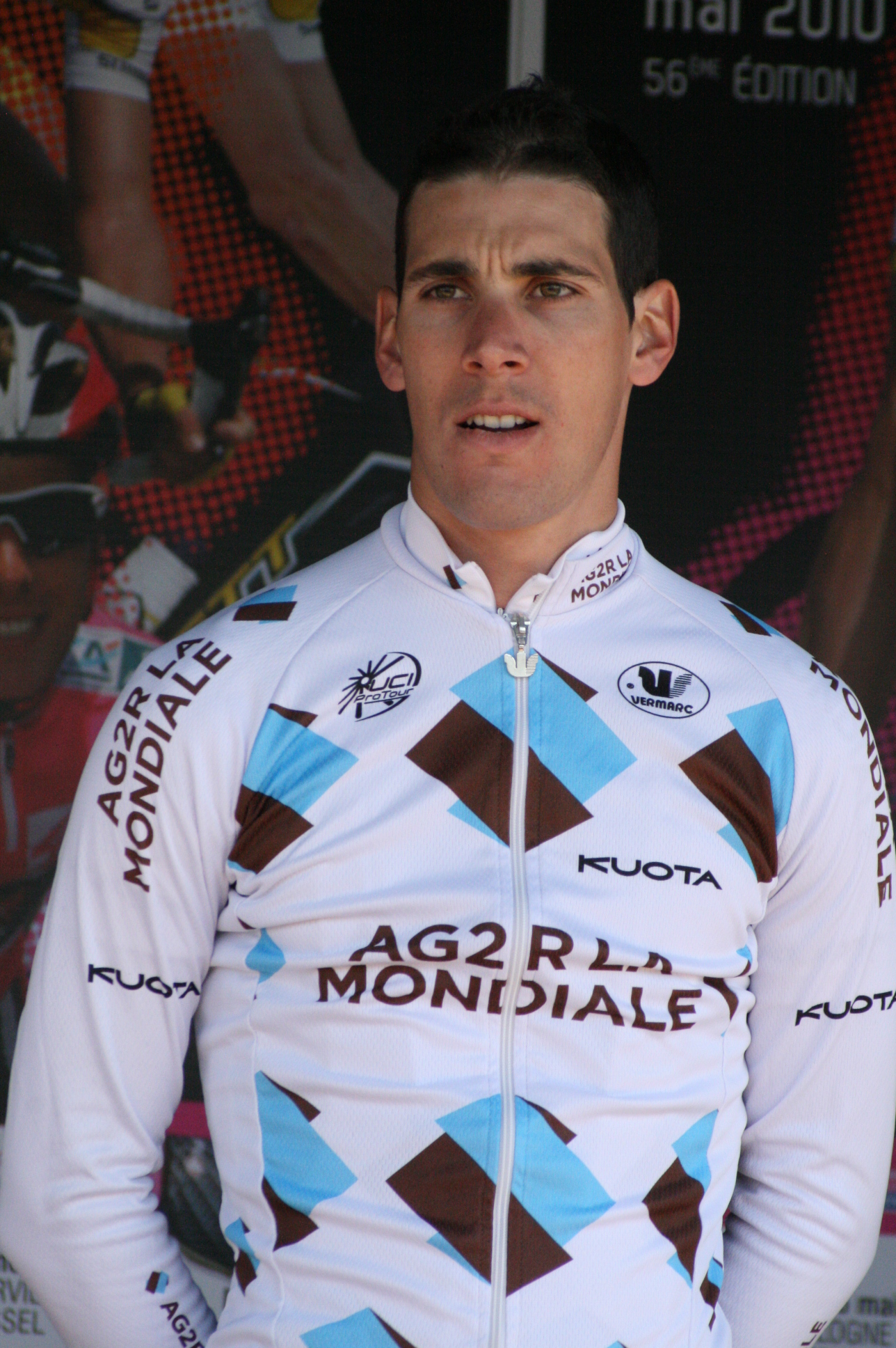 Julien Loubet lors de la présentation des équipes des 4 jours de Dunkerque